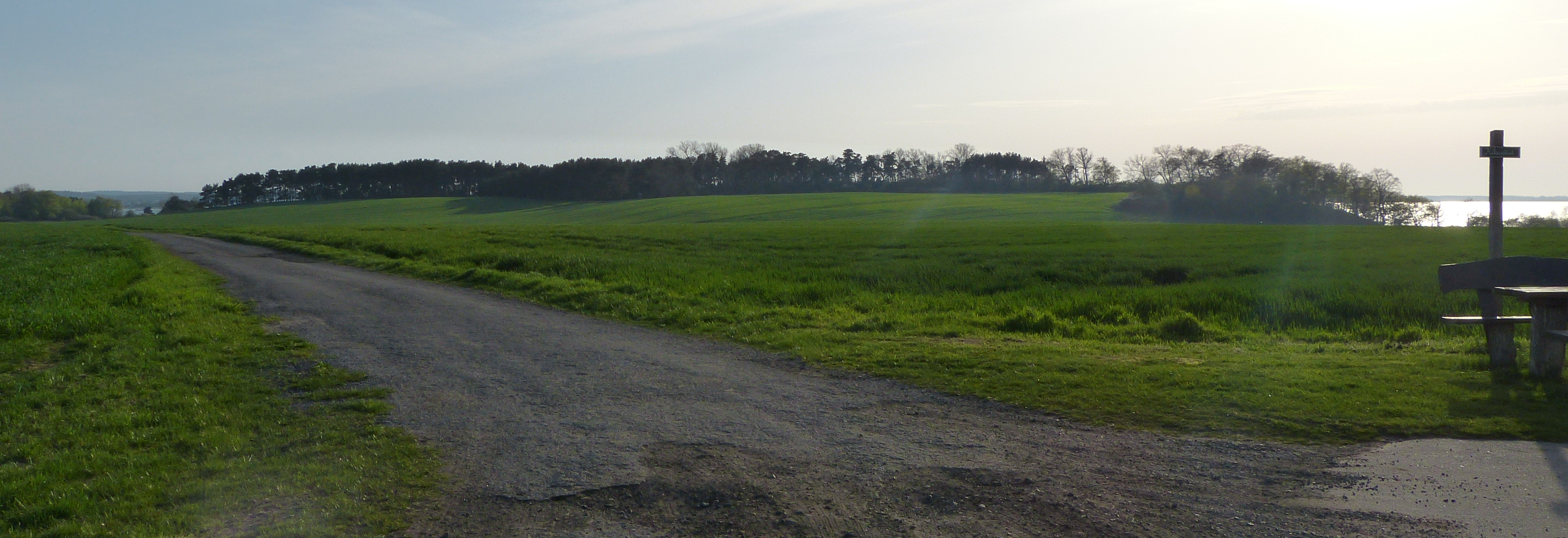 Blick aus nordöstlicher Richtung zum Konker Berg bei Pudagla